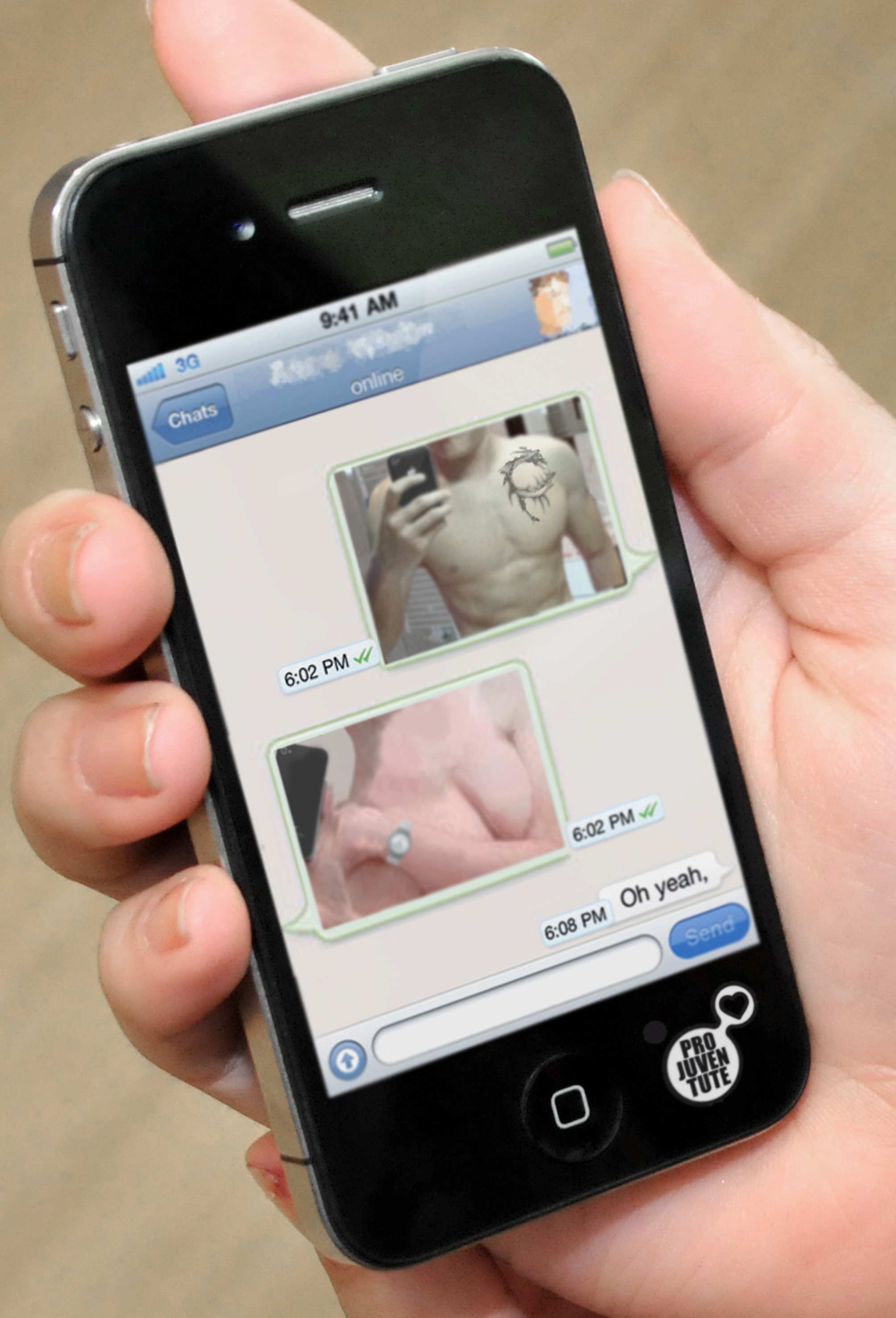 Aufklärungskampagne ‚Sexting’ Bildmaterial mit Copyright der Quellenangabe zur freien Verfügung verwendbar (©Pro Juventute) Unter dem Slogan ‚Sexting kann dich berühmt machen. Auch wenn du es gar nicht willst.‘ macht die Aufklärungskampagne von Pro Juventute auf Risiken von Sexting aufmerksam. Ein TV-Spot und Plakate zeigen provokativ auf, dass der Missbrauch von intimen Fotos harte Konsequenzen haben kann – für Betroffene wie für Täter. Mit einer für die Kampagne entwickelten Facebook-App können Jugendliche im Sinne eines Cyber-Risiko-Checks ihr Profil überprüfen. Auf der Kampagnenplattform finden Jugendliche und Eltern Informationen zum Thema. Allen Schulen in der Schweiz werden Materialien angeboten, um Jugendliche auf die Hilfe via Notrufnummer 147 von Pro Juventute aufmerksam zu machen.